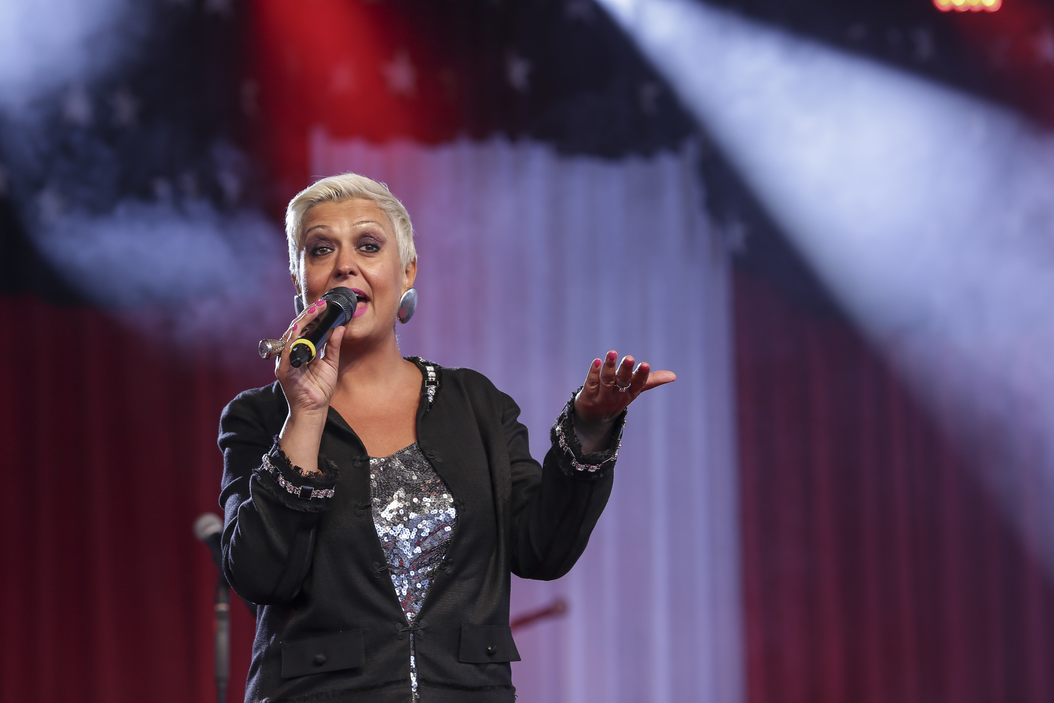 100 Years Of Friendship. A fost tema recepţiei de Ziua Independentei, când am sărbătorit împreună independenţa Americii, centenarul unităţii României şi prietenia dintre SUA şi România. Am avut lângă noi distinşi oaspeţi, prieteni dragi şi curajoşi, care nu s-au speriat de furtună şi au rămas alături de noi, pentru ca în final să fim binecuvântaţi cu un curcubeu superb. Mulţumim, România! 🇷🇴🇺🇸❤️ Octav Ganea / Inquam Photos --- 100YearsOfFriendship #July4th #IndependenceDay #ZiuaIndependentei #Bucharest #Bucuresti #Romania